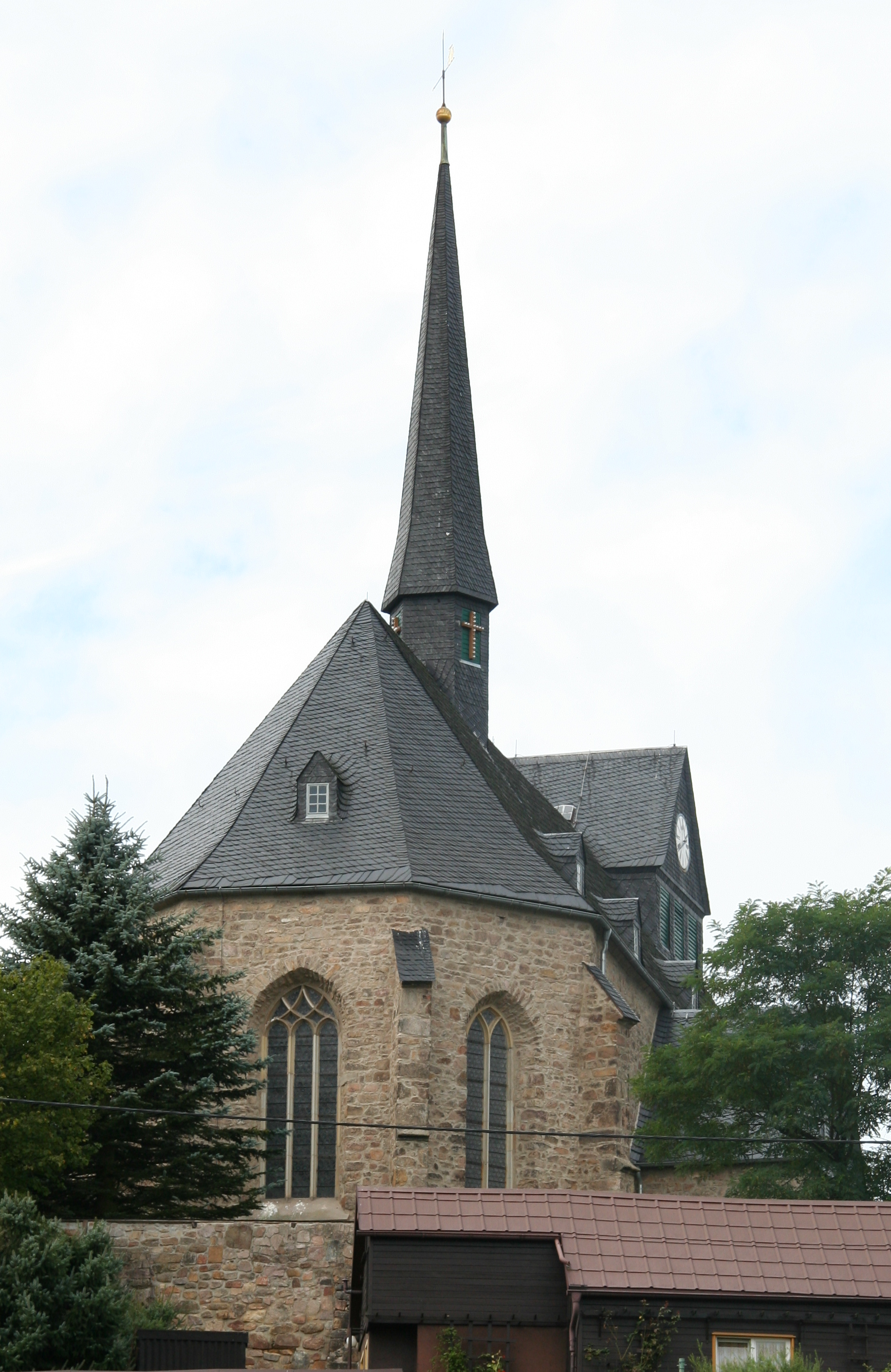 Michaeliskirche in Hirschfeld